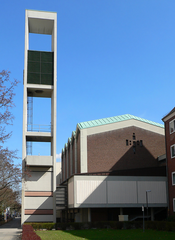 Athanasiuskirche Hannover-Südstadt